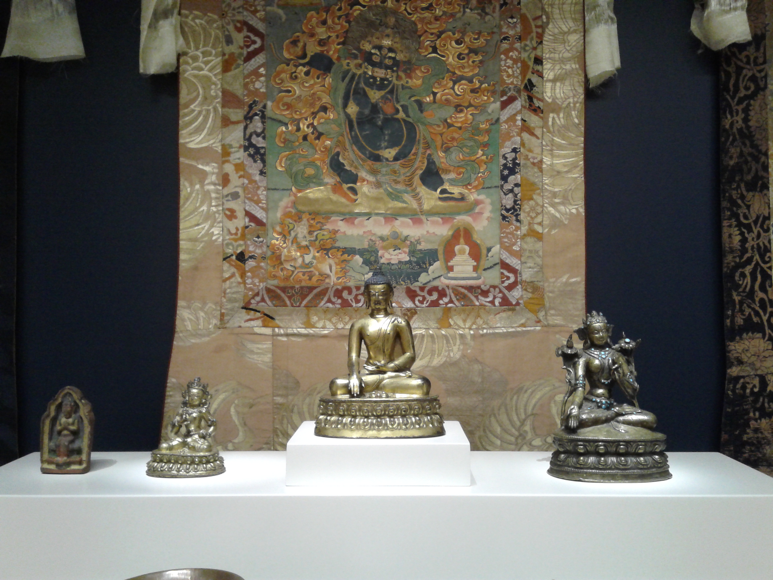 National Gallery of Victoria